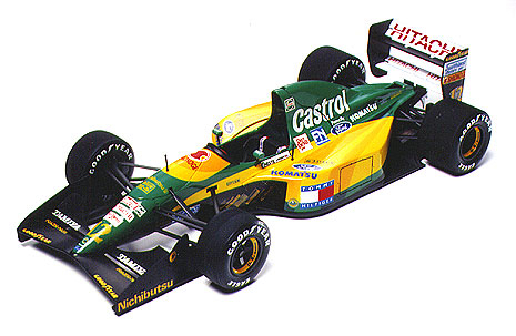 Lotus 107 (Frontalansicht)